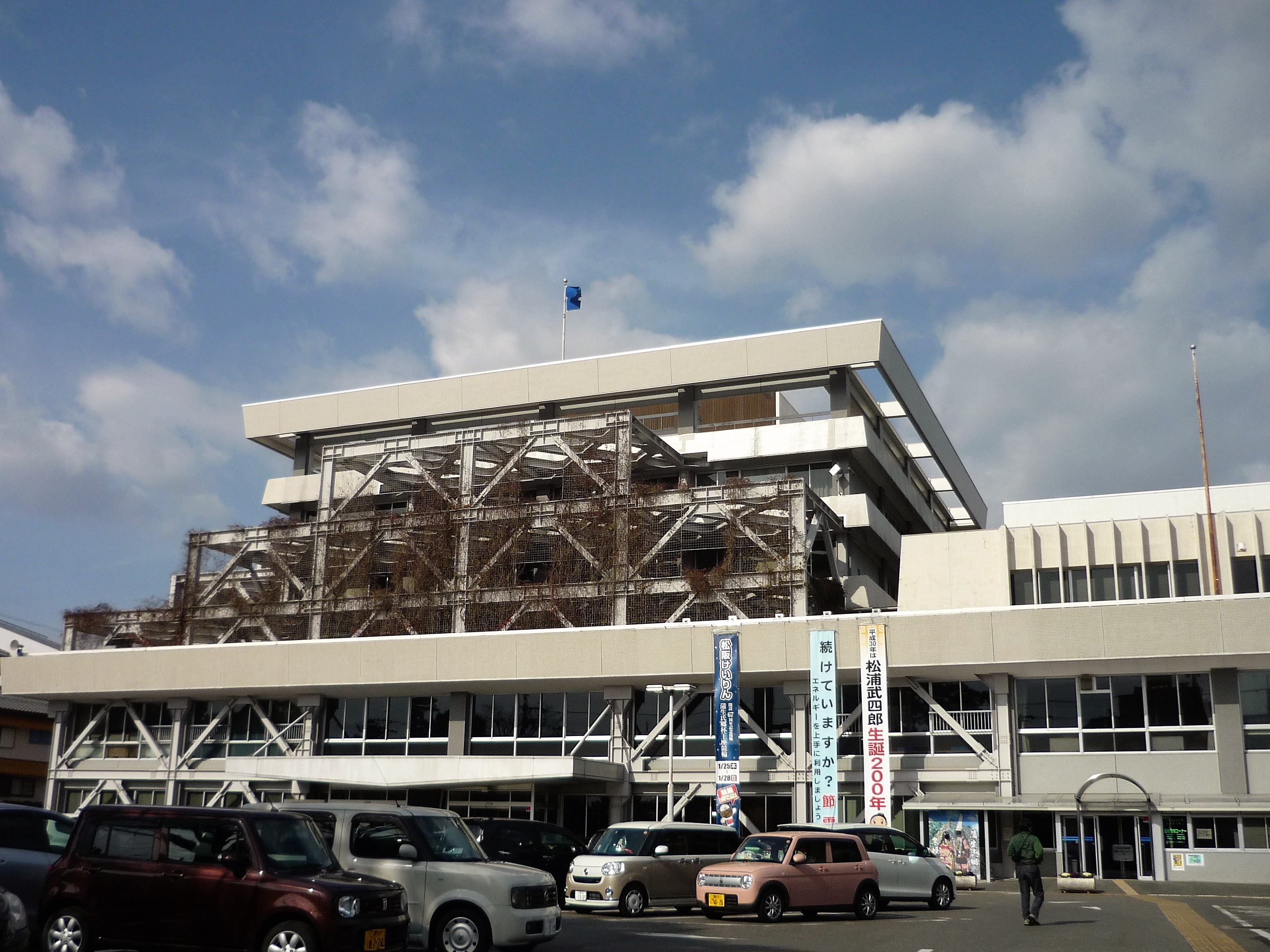 松阪市役所（2018年撮影） Panasonic Lumix DMC-FS3